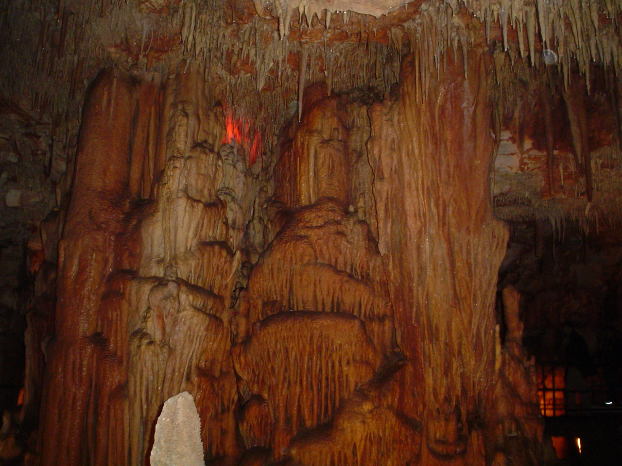 foto non professionali e assolutamente di pubblico dominio da me fatte in data 01/01/06